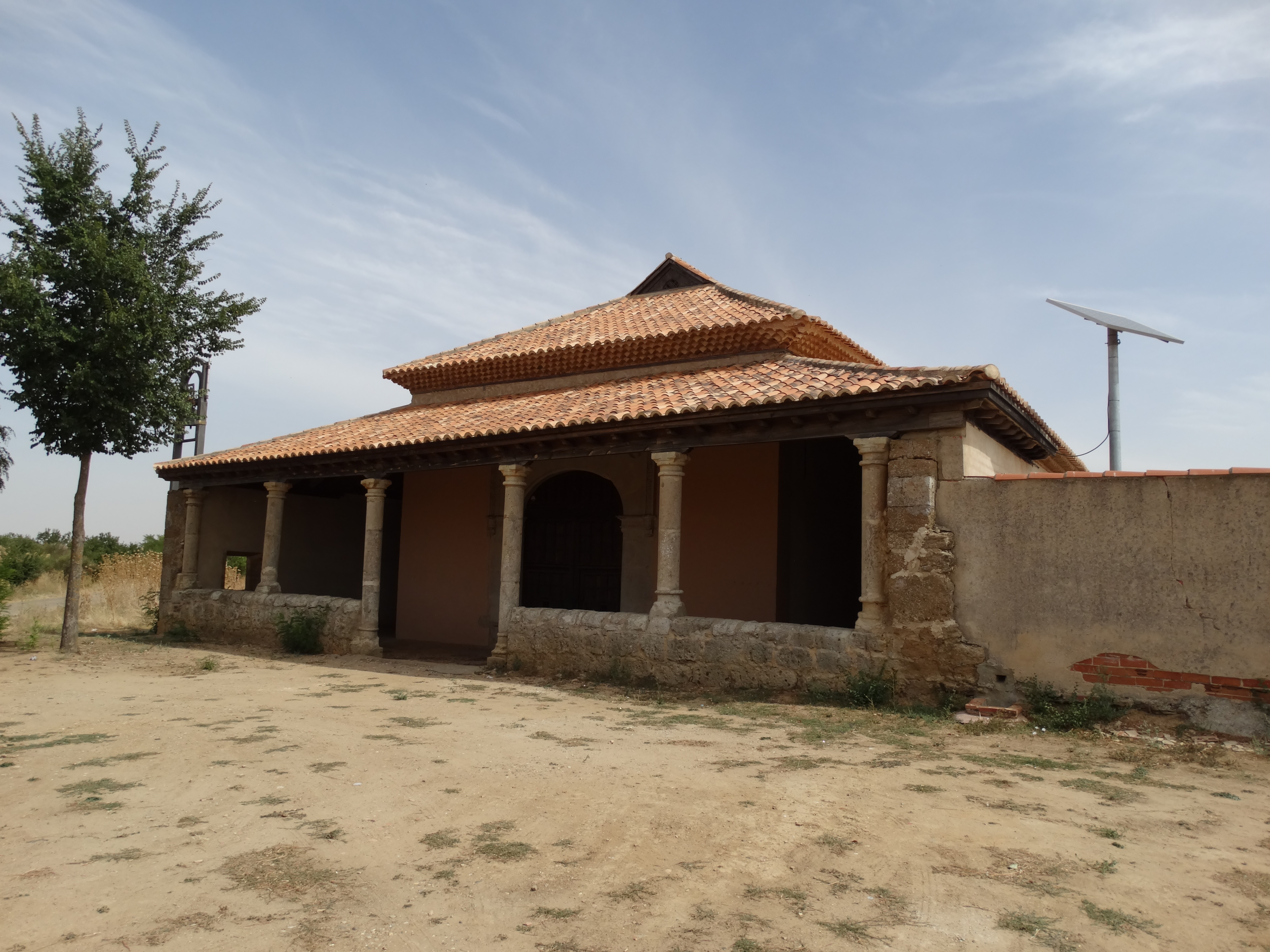 Pozuelo de la Orden, provincia de Valladolid, España. Ermita de Santa Ana, edificio con un artesonado mudéjar de gran valor y pinturas del siglo XVII recuperadas en la última restauración. Está catalogado como BIC.